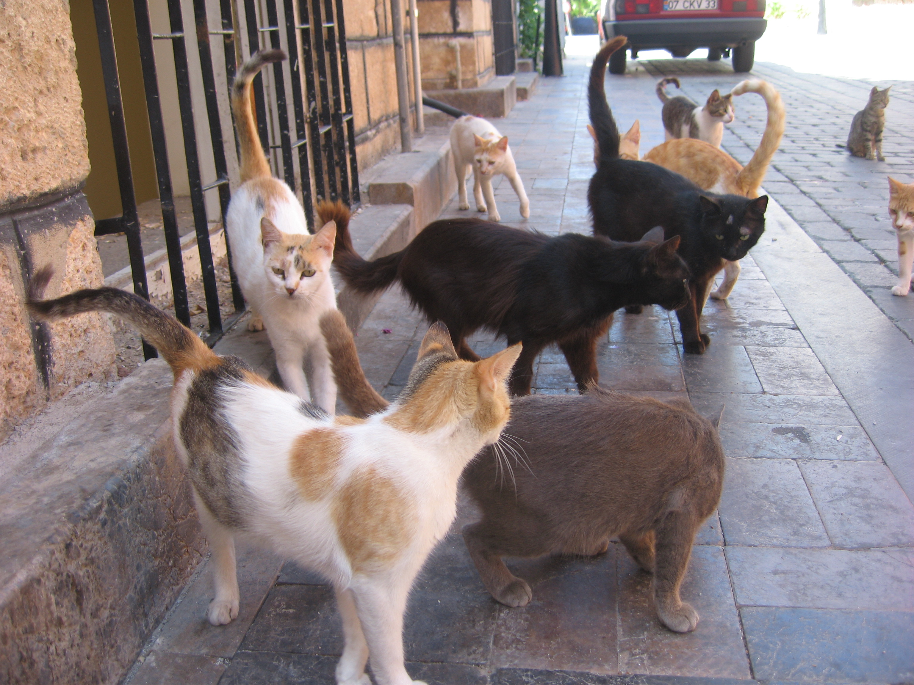 トルコのアンタルヤで撮影した猫の写真です。